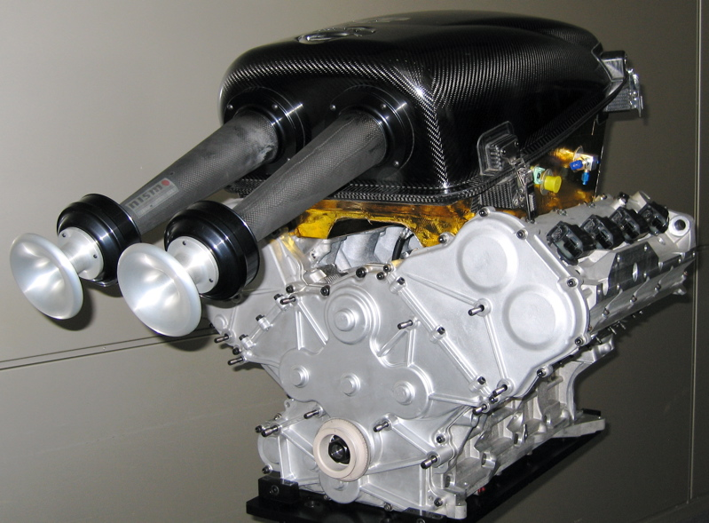 Super GT series.